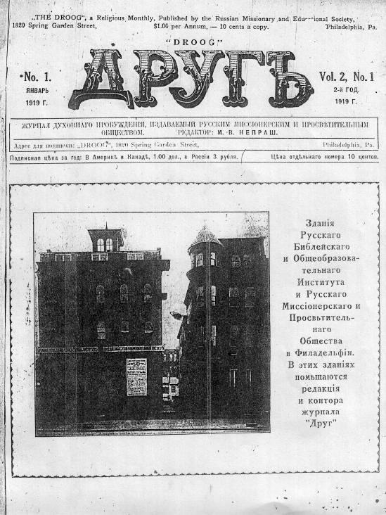 Журнал русских баптистов-эмигрантов. 1919 год. Издавался в г. Филадельфия, Пенсильвания, США. На обложке фото здания Русского Библейского института в Филадельфии, где обучали проповедников и миссионеров.